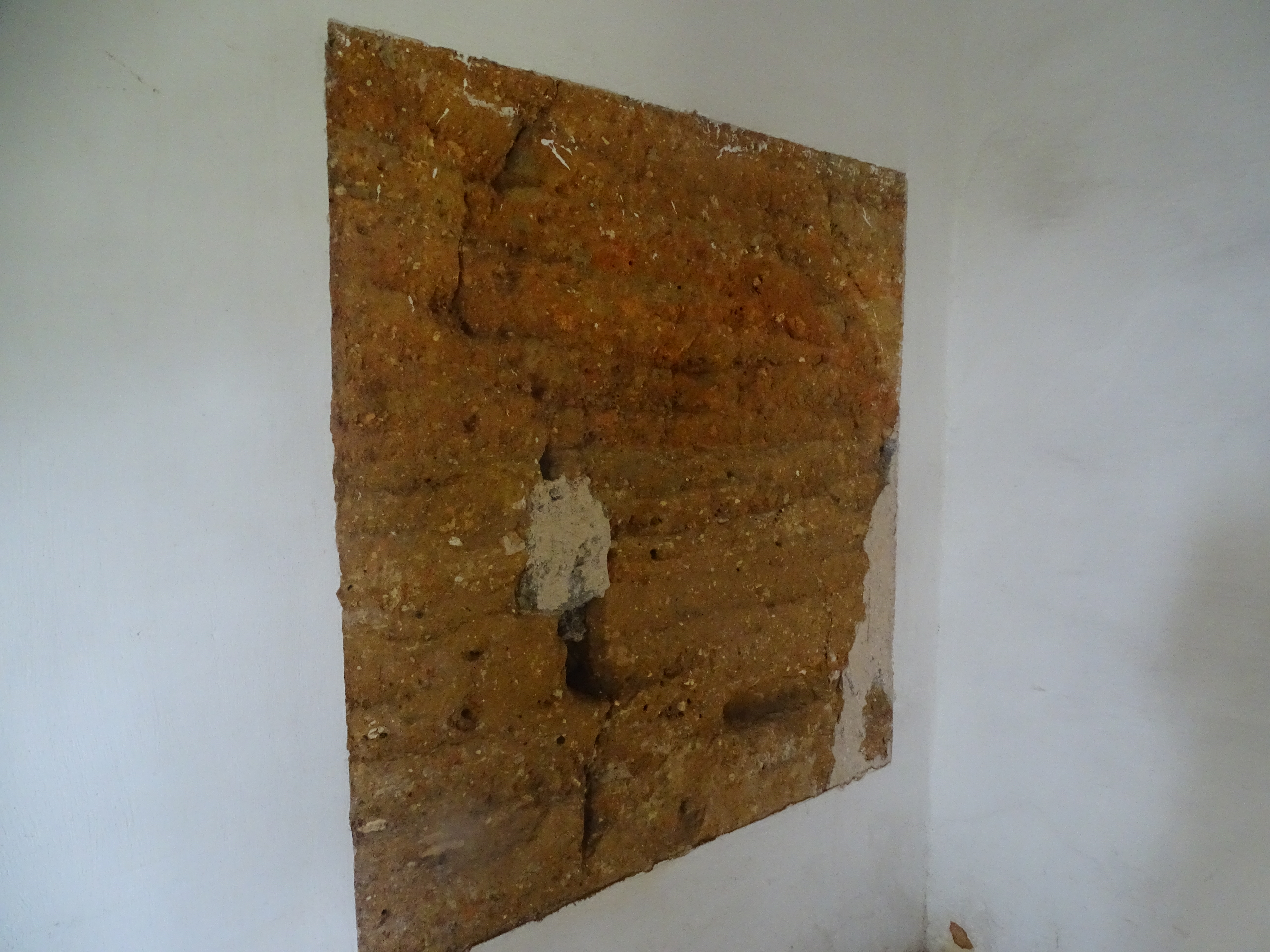 A parede da casa foi feira de taipa de pilão, que misturava barro, fezes e sangue de animais como vaca e boi e pedras, e era inserido em uma taipa para formar. A resistência deste material é extremamente forte e seguro.